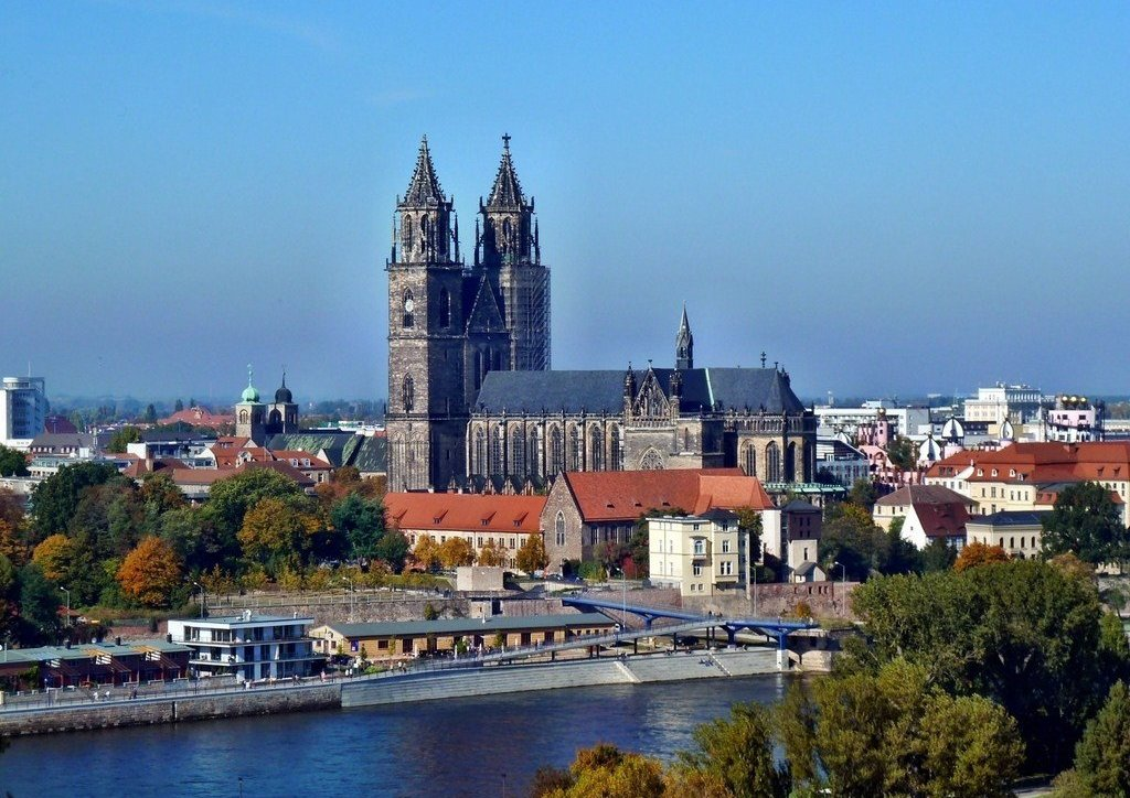 Dom zu Magdeburg St. Mauritius und St. Katharina - ab 1207 errichtet und im Jahr 1363 geweiht